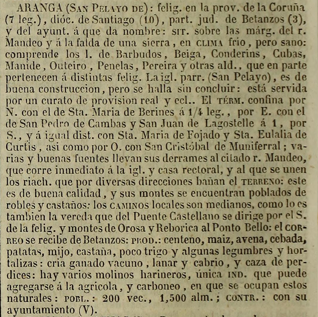 Aranga no Diccionario geográfico-estadístico-histórico de España y sus posesiones de Ultramar.